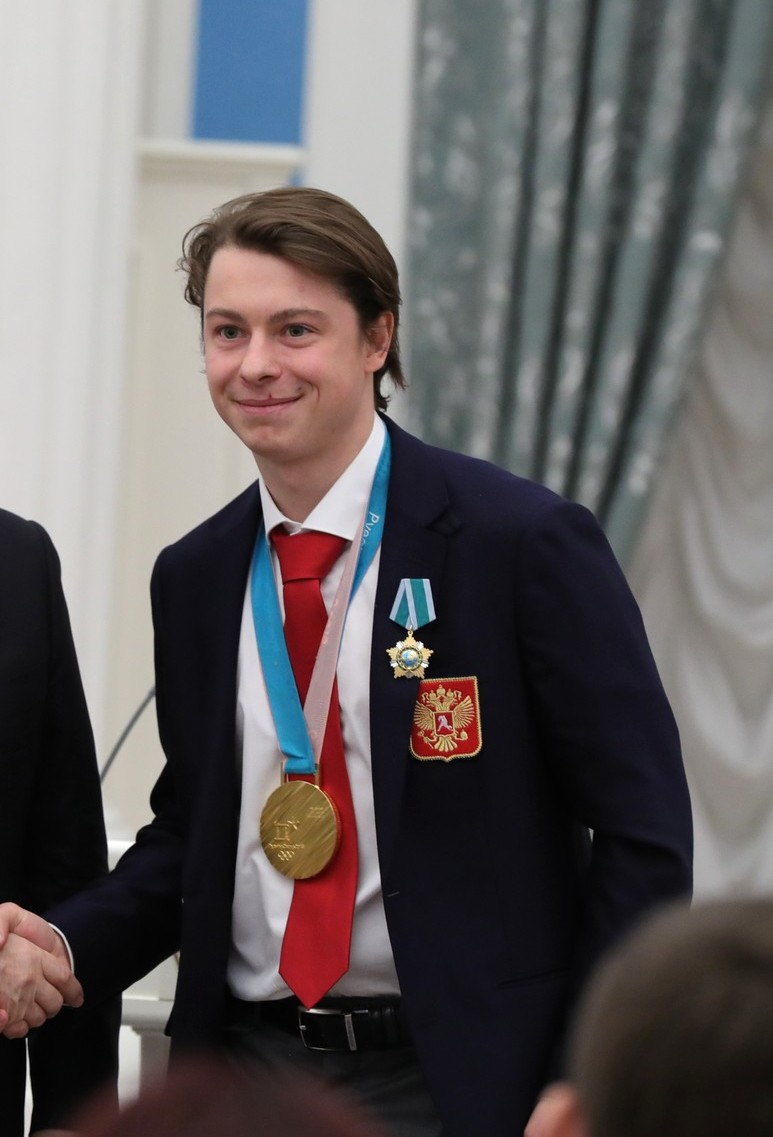 С олимпийским чемпионом по хоккею Никитой Гусевым.